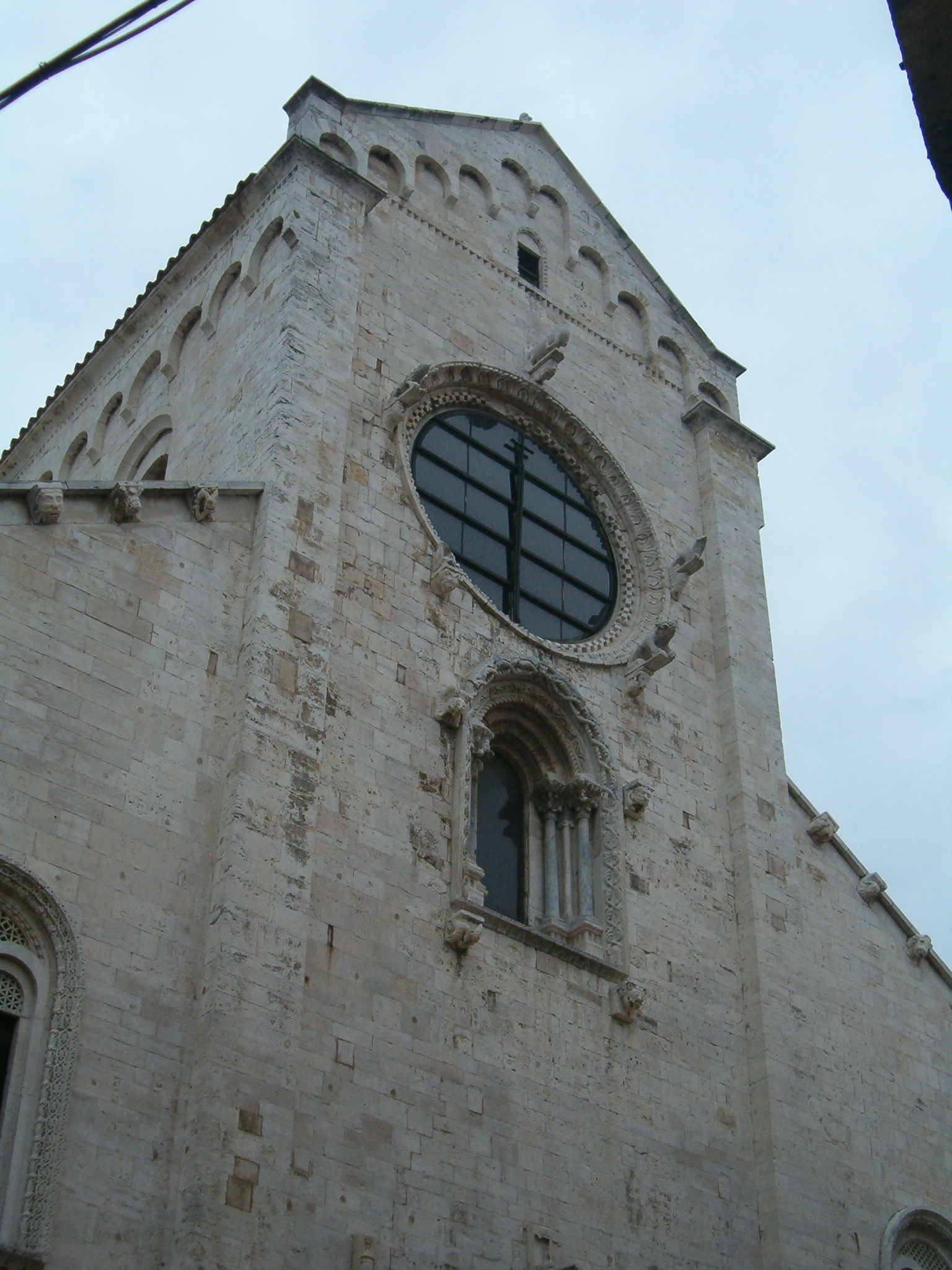 Barletta (Puglia, Italy). Cattedrale.